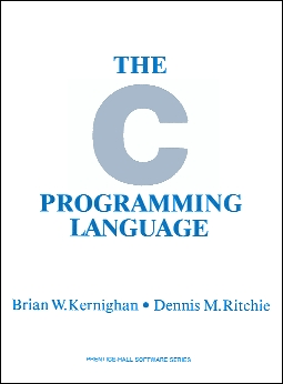 The C Programming Language 1st edition cover